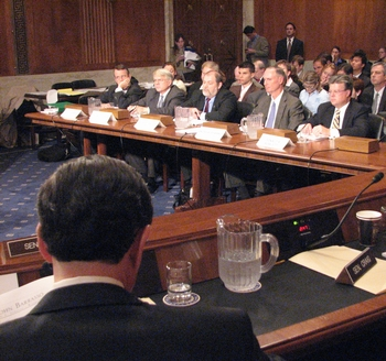 US. Senate in 2007.